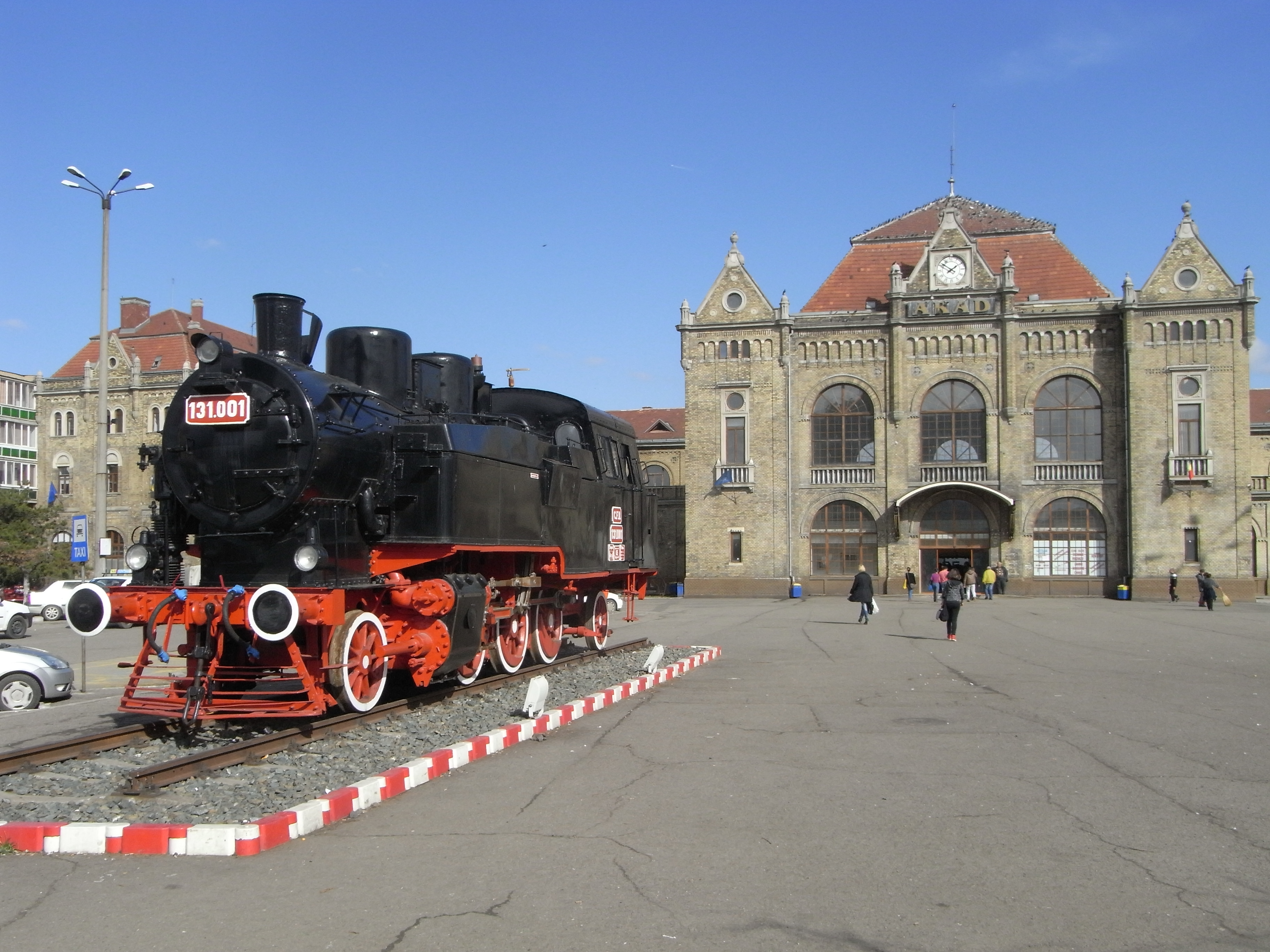 Bahnhof von Arad (RO) mit ausgestellter Dampflokomotive 131.001.